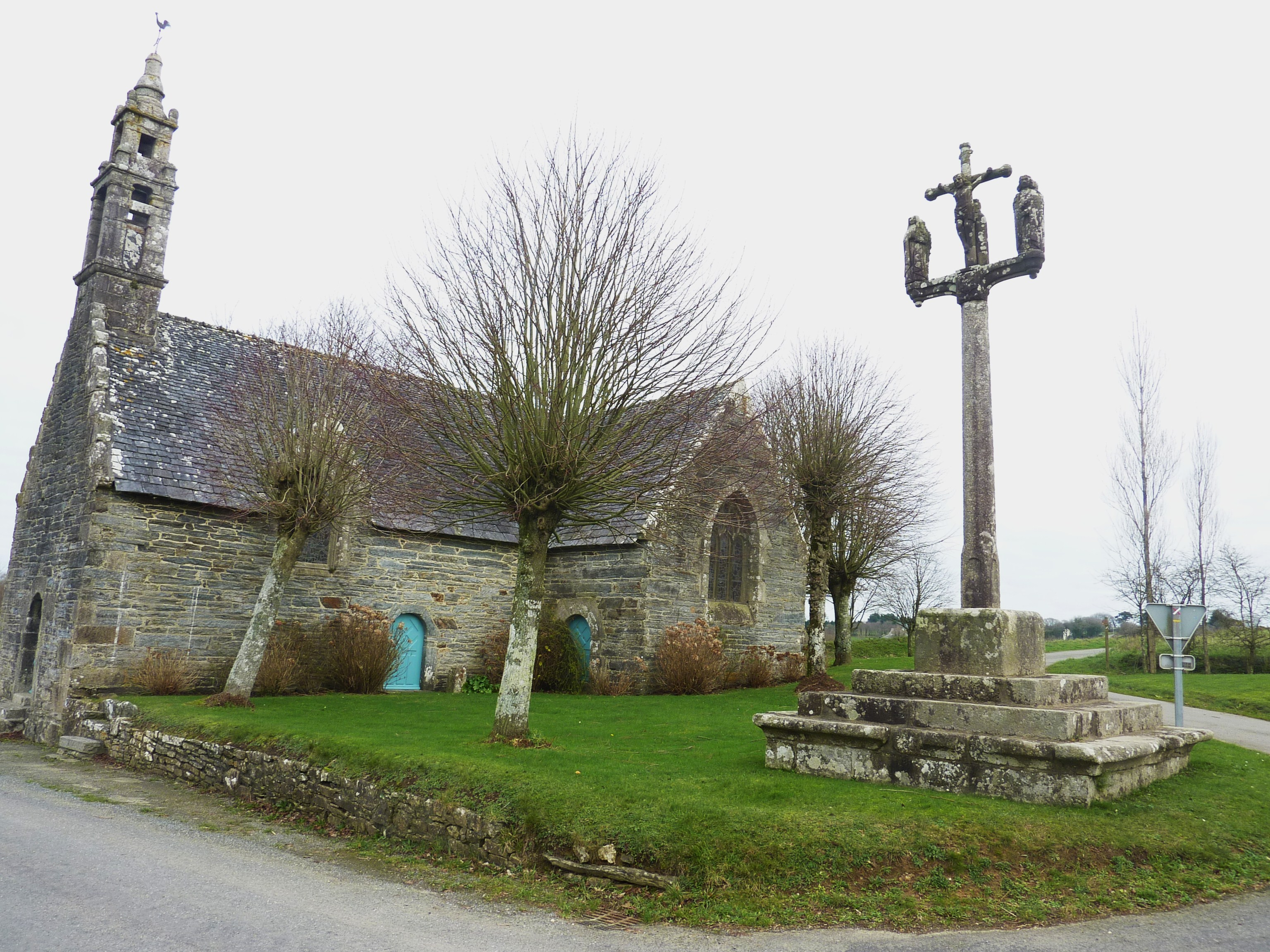 Lamaaul-Guimiliau : la chapelle Sainte-Anne et son calvaire